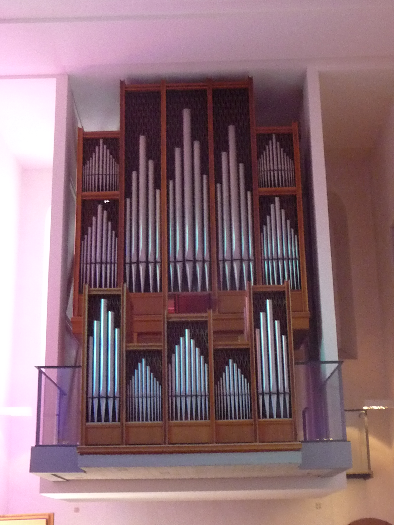 Die Abtei Neuburg (Abtei vom heiligen Bartholomäus) bei Heidelberg, auch als Stift Neuburg und Kloster Neuburg bekannt, ist ein Benediktinerkloster.